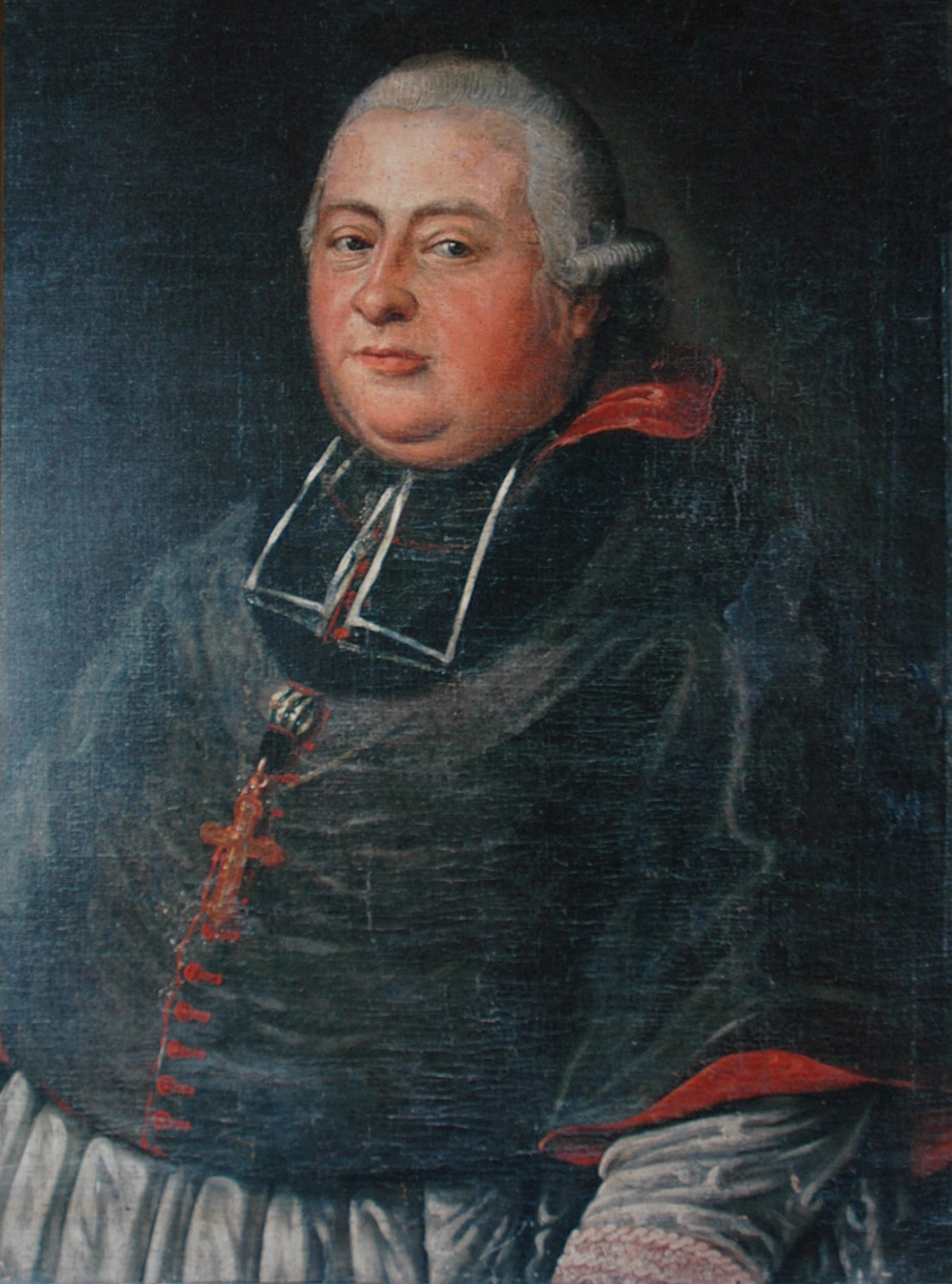 Zeitgenössisches Portrait Philipp Damiaans von und zu Hoensbroech (1724–1793), Bischof von Roermond